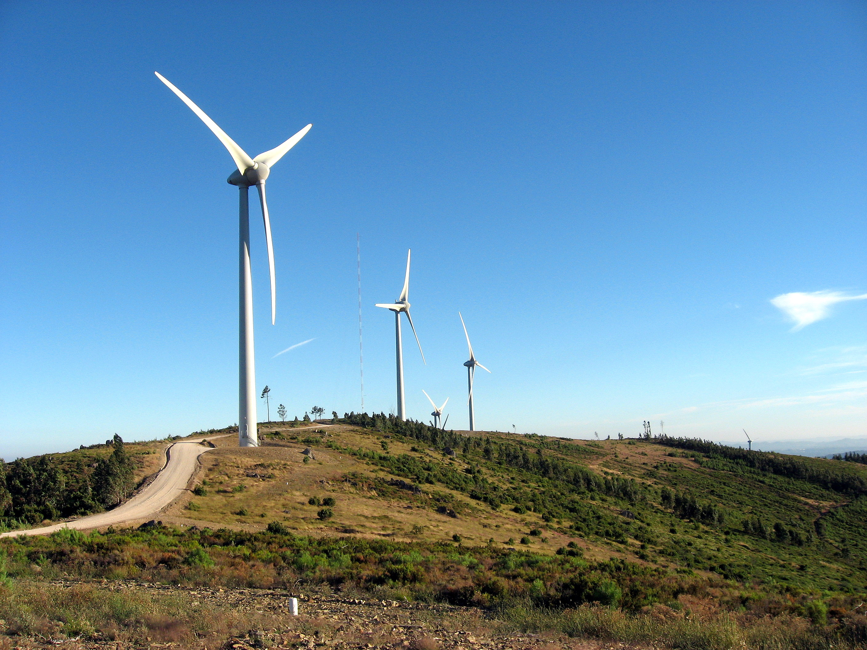 O maior parque eólico no concelho de Proença-a-Nova, na serra do Cabeço da Rainha.